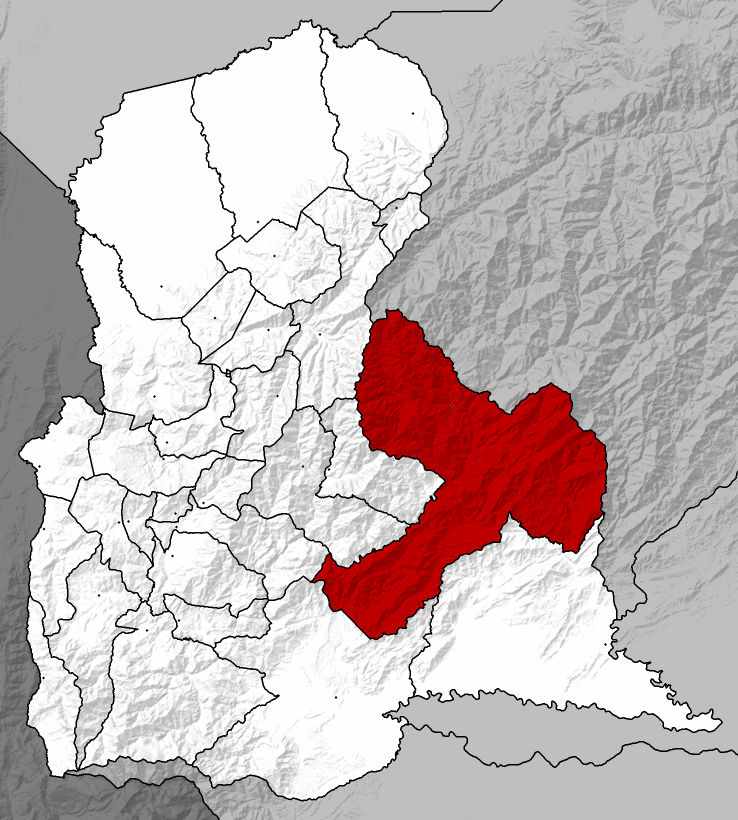 Municipio Uribante - Táchira